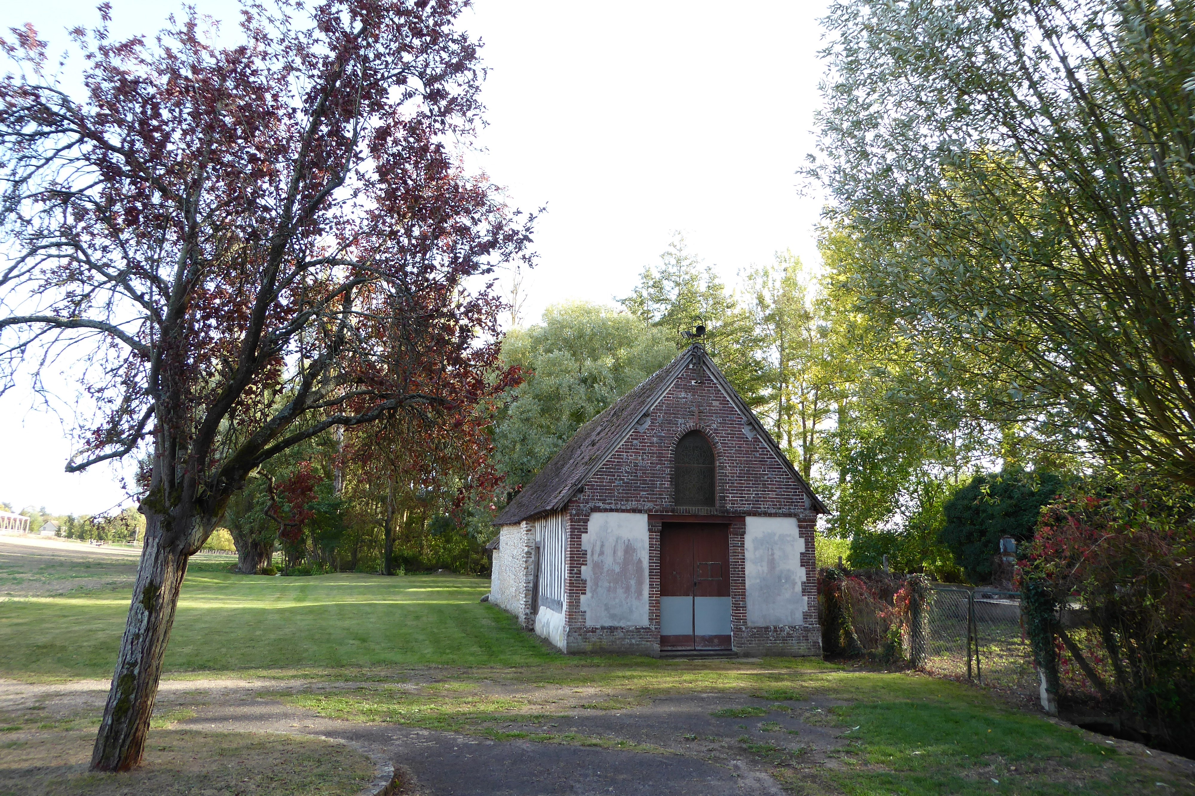 chapelle Sainte-Geneviève, Senantes, Eure-et-Loir, France.